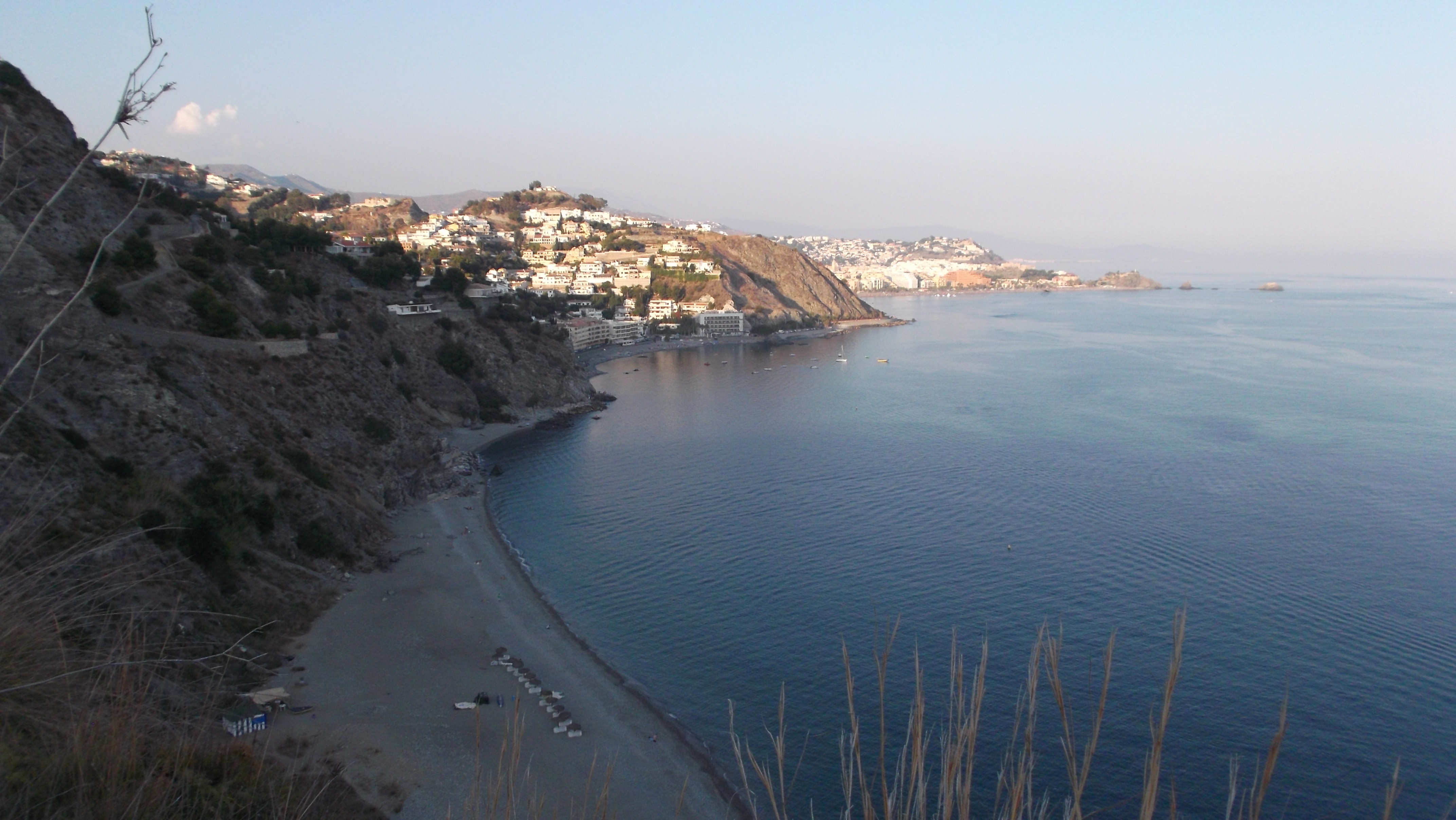 Vista de la localidad de almuñécar y de la playa El Muerto en primer plano.